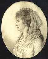 Magdalene Pauli geborene Poel geboren Archangelsk am 23. Februar 1757, gestorben in Bückeburg am 4. Januar 1825